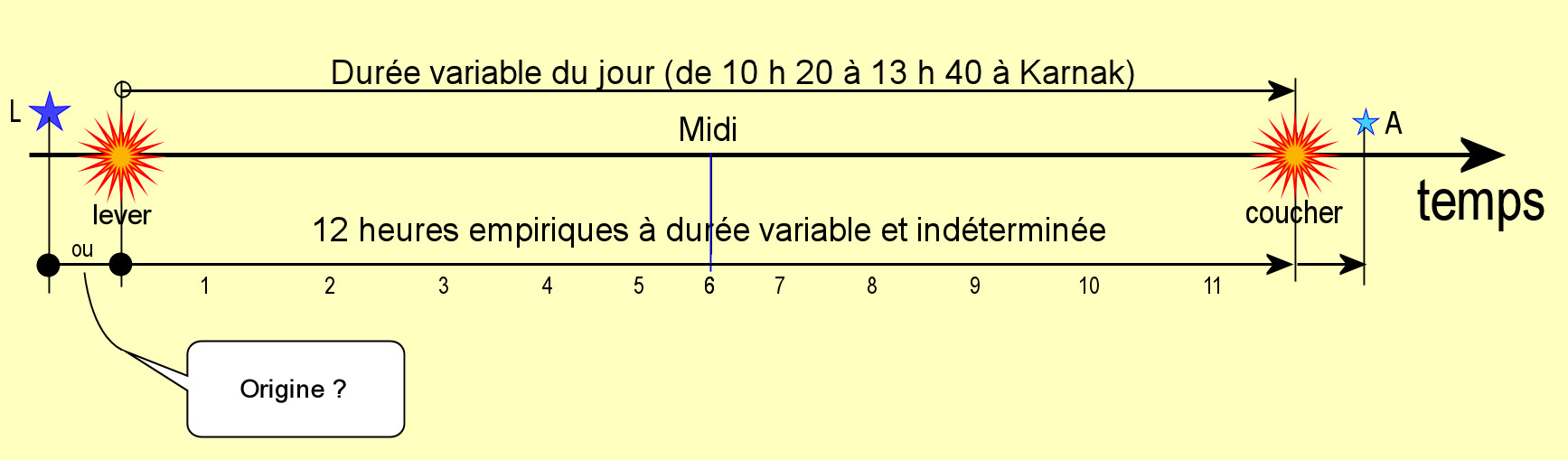 Essai de schématisation des heures de gnomon